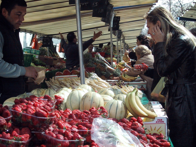 Marktszene in Paris Obstmarkt auf dem marché d'Aligre in Paris